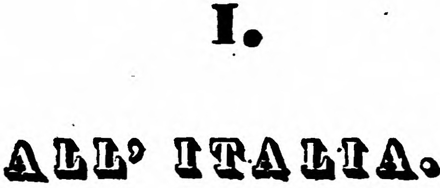 Opere di Giacomo Leopardi, Volume I: Canti a cura di Antonio Ranieri, Saverio Starita, Napoli 1835